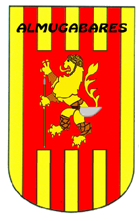 Estandarte del grupo ALMUGABARES